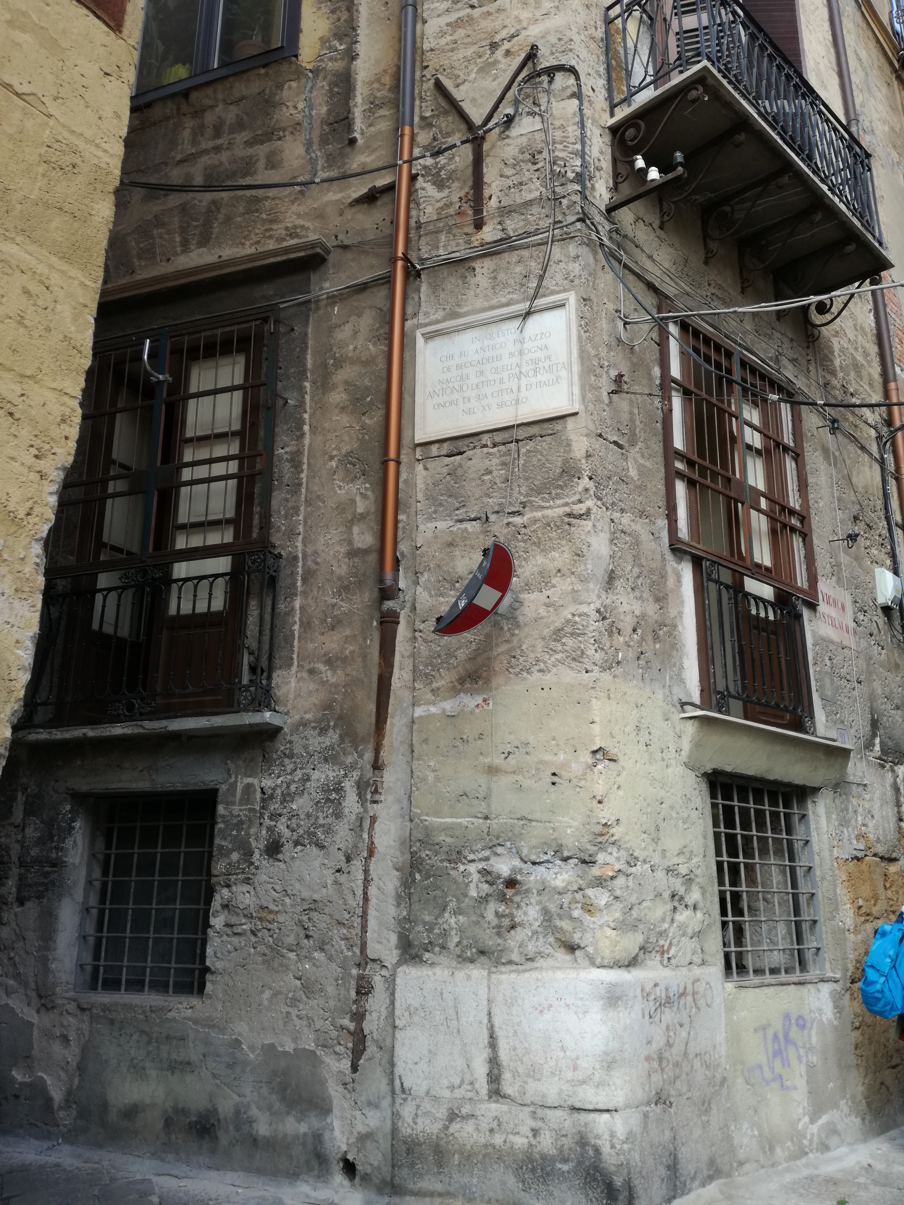 Sicilianu: Casa ri Antonio Beccadelli "Il Palermitanu"